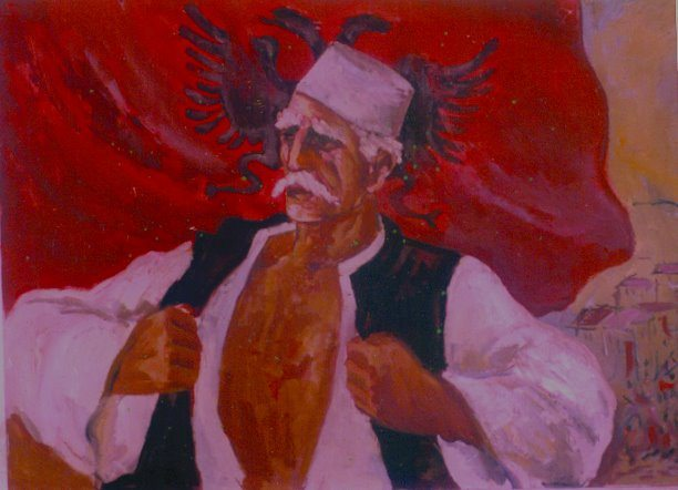 Pikturë e Elez Koçit.